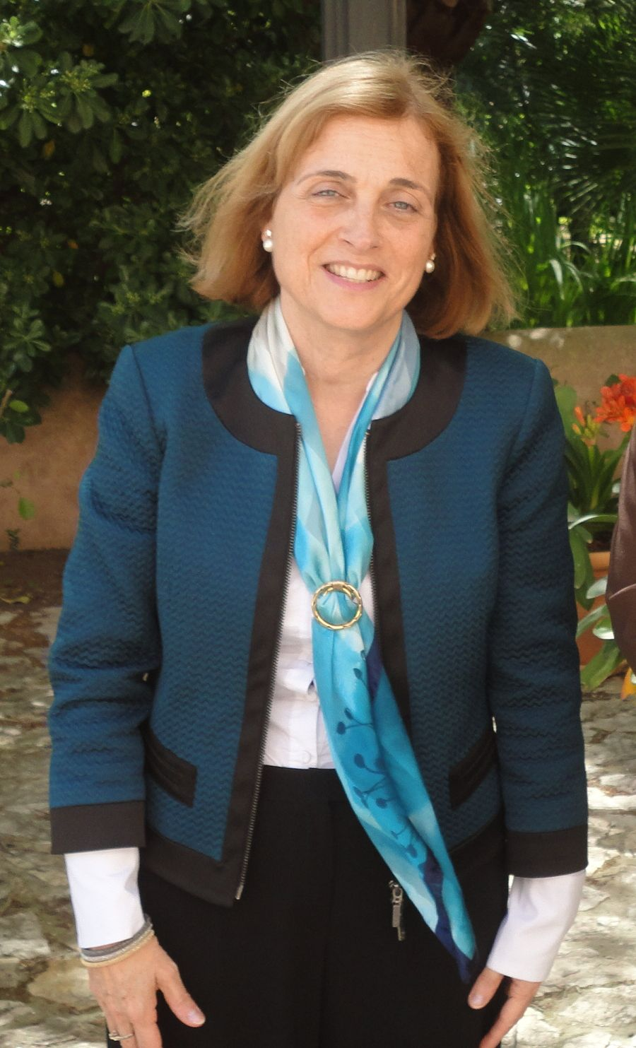 Montserrat Casas Ametller, exrectora de la UIB (2007-2013). Foto presa a l'exterior del Rectorat de la UIB.